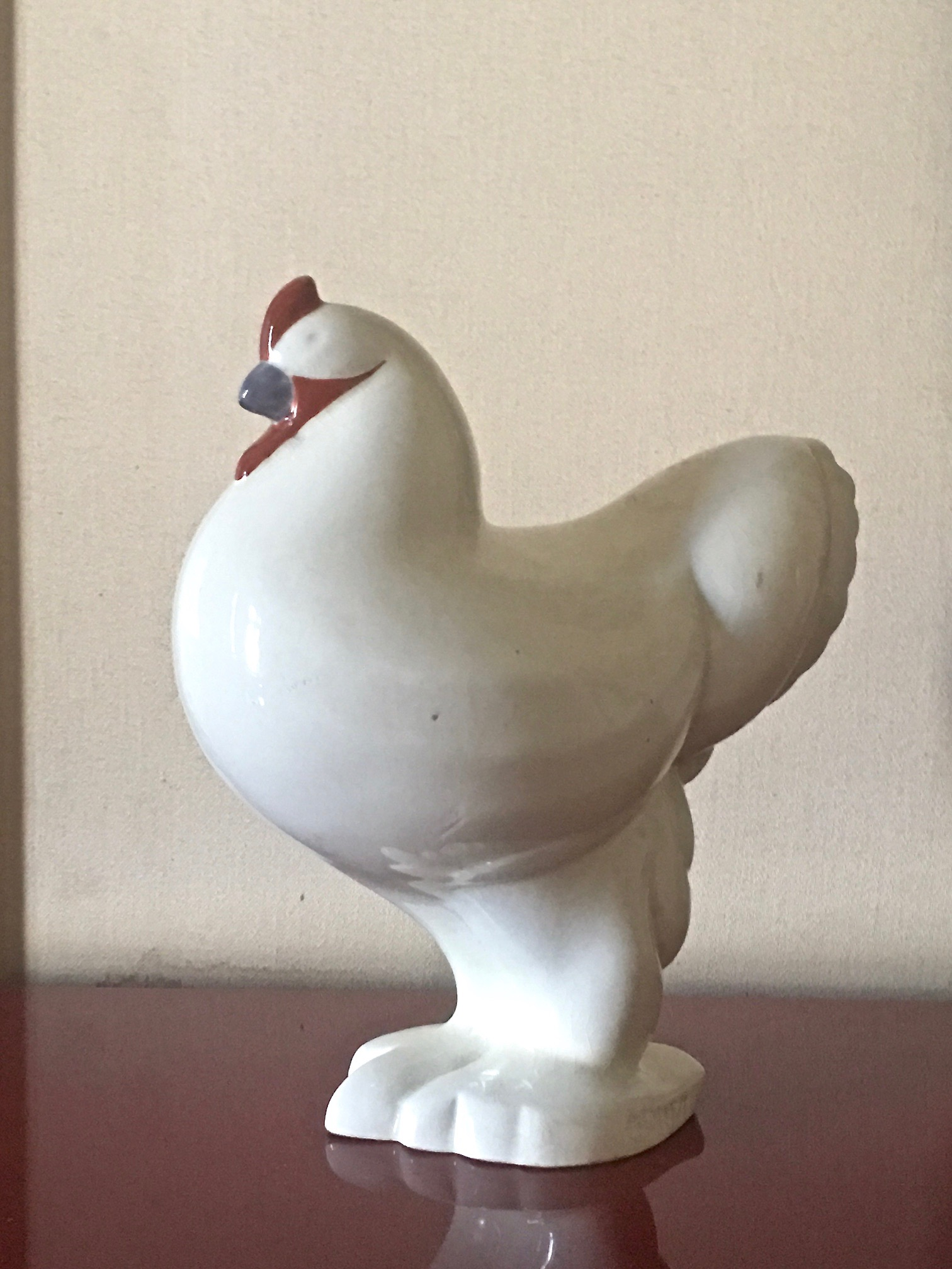 Poterie vernissée et peinte représentant un coq dodu et fier vendu en «produit dérivé» du spectacle Chantecler d'Edmond Rostand en 1910.